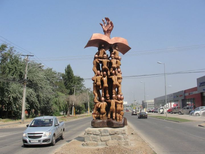 Monumento realizado en madera en homenaje a los 33 mineros rescatados en la mina San José.